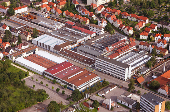 Luftbild des Werkes Erhard in Heidenheim an der Brenz